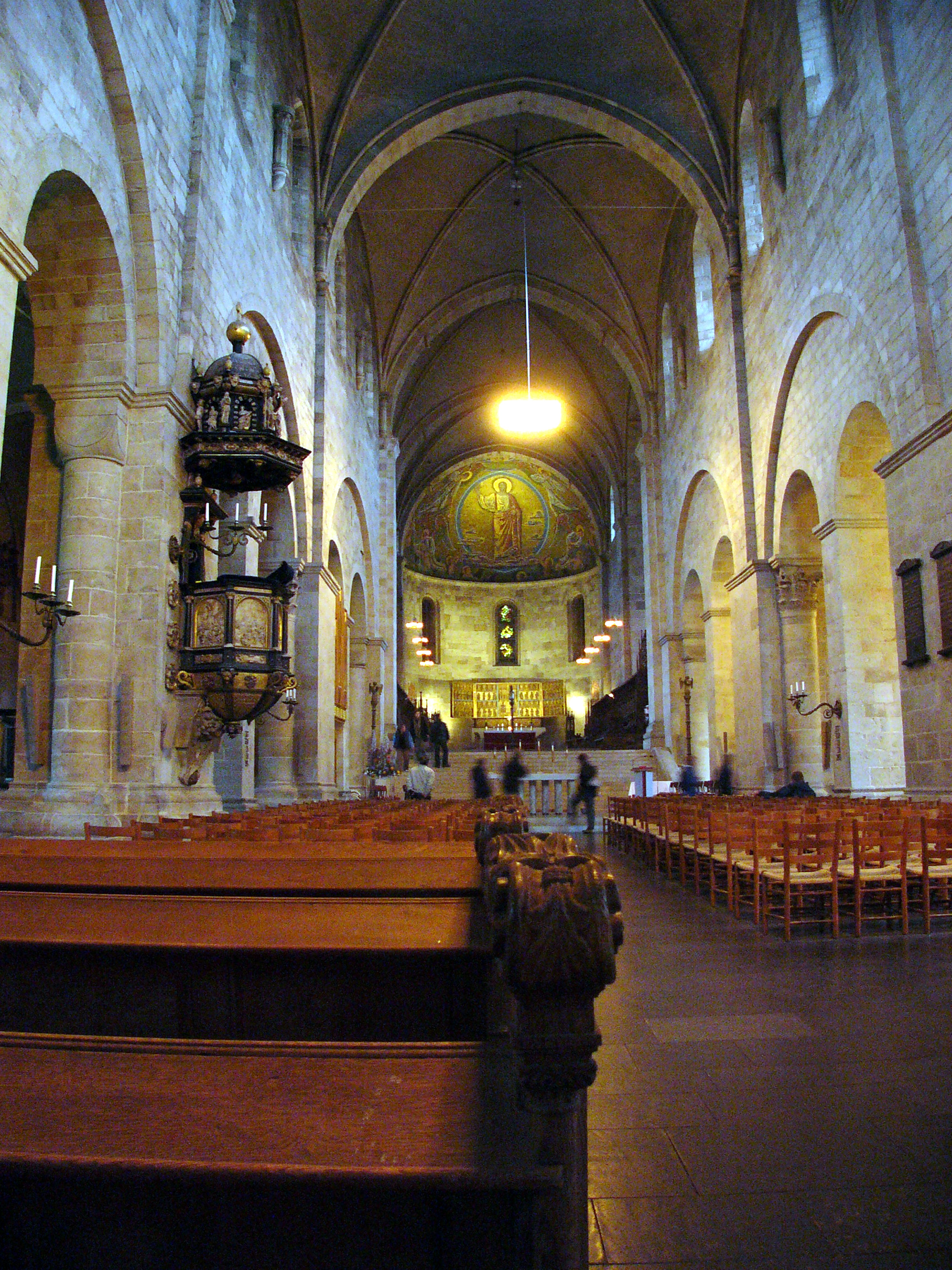 1103/04 errichtete Papst Paschalis II. auf dänische Initiative das Erzbistum Lund. Dom zu Lund, Innenraum.